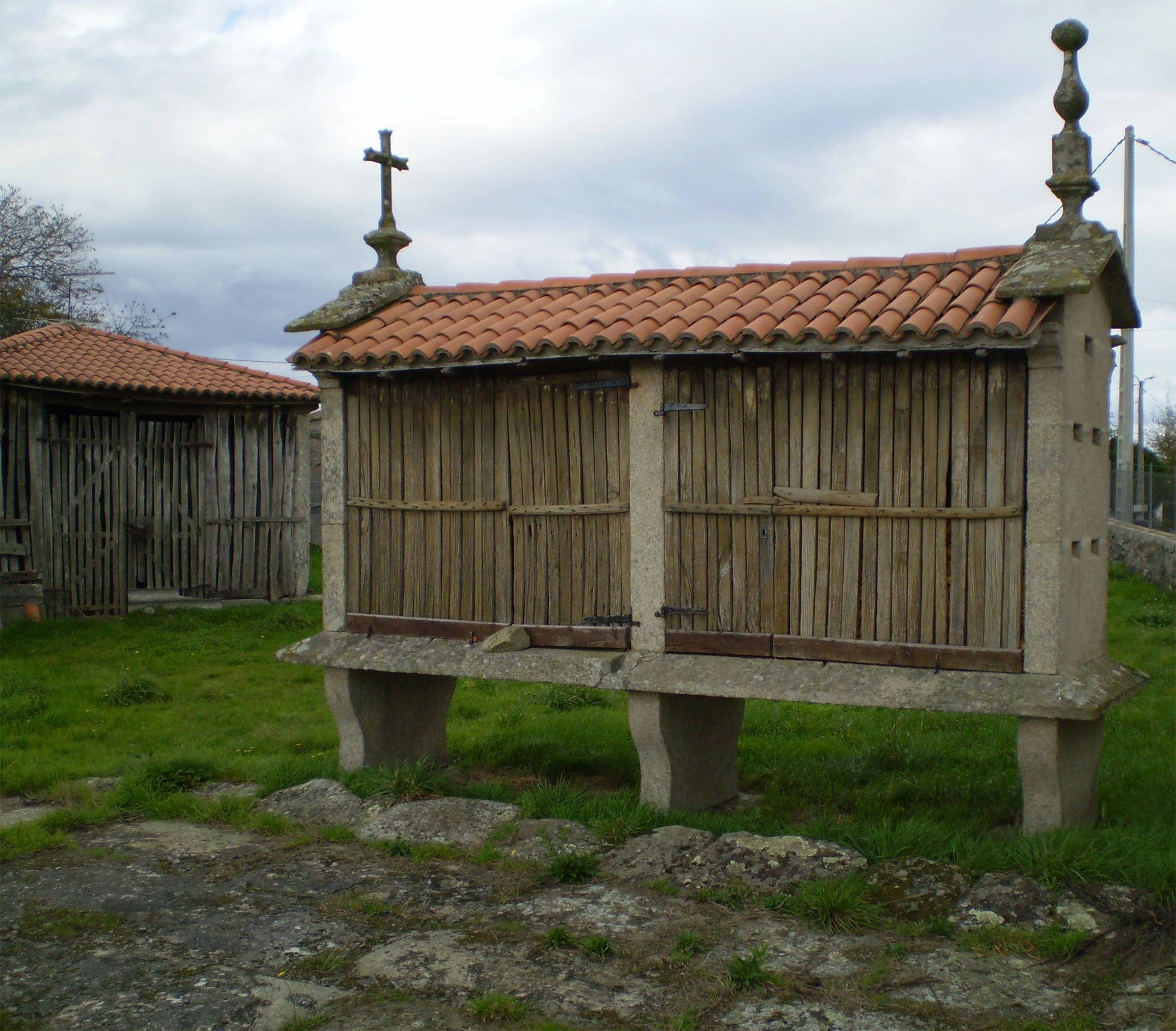 Horreo de tipo mahía, de dous claros, sobre tres cepas, cuberta de tella do país e adornado con cruz e lampión fusiforme. Ubicado a carón da aira (pódense aprezar as laxes da mesma); e moi perto doutra construcción complementaria: a palleira. (Boa intervención nestes elementos, que manteñen un estado de conservación moi aceptables). Sitos no lugar de Paredes, parroquia de Barreiro (Antas de Ulla)